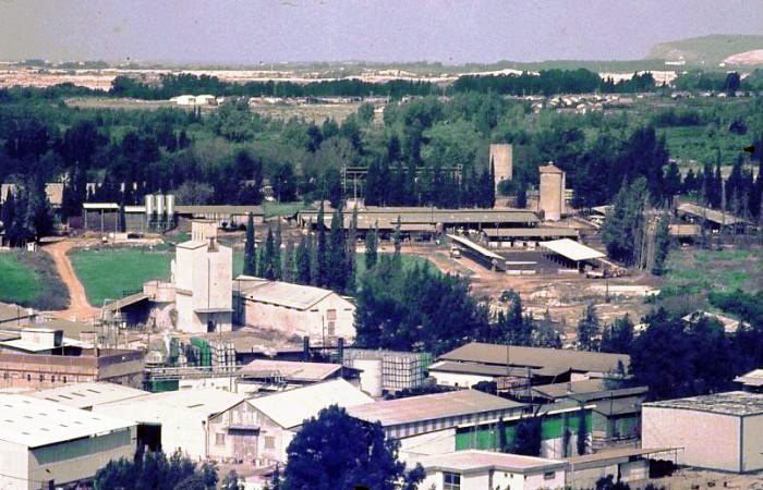 גן-שמואל 1975-80 - מראה מלמעלה - בית החרושת סילו הגרעינים ומחסני לנדי הרפת והסילו ברפת מגדל המים במוסד ובמרחק - פרדס-חנה והר-קרן הכרמל